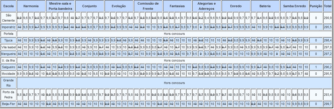 Resultados do Carnaval do Rio - 2011